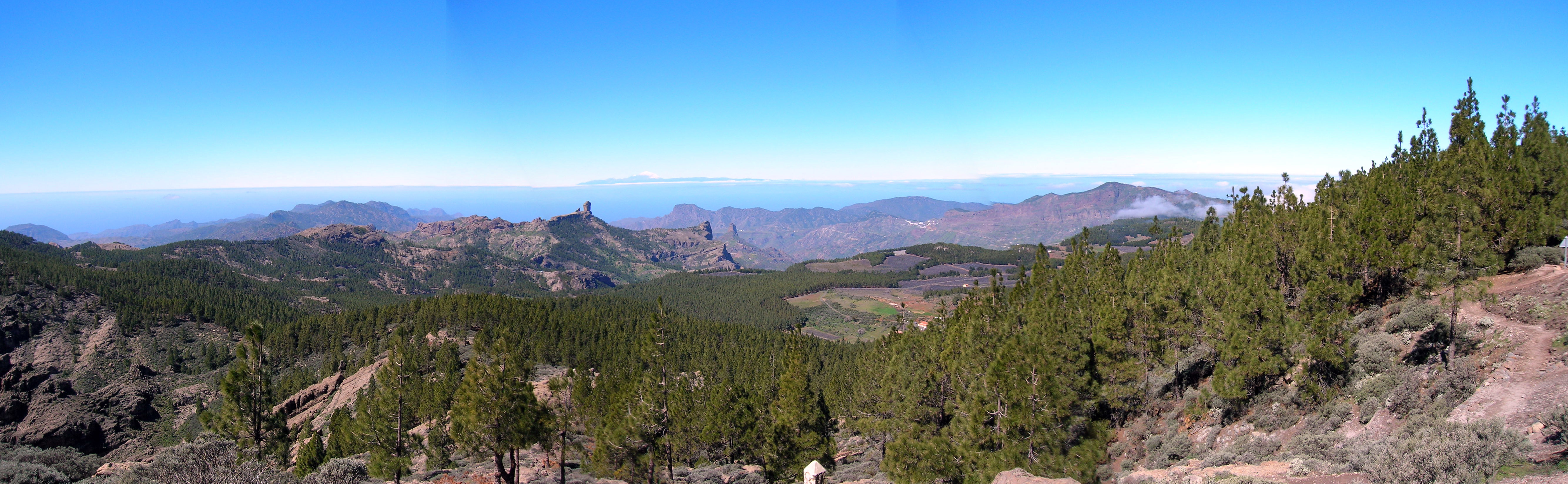 Bildbeschreibung: Der Blick von einem Berg im Landesinneren in den Osten. Im Hintergrund ist Teneriffa mit dem Teide (3700m, höchster Berg Spaniens) zu sehen.